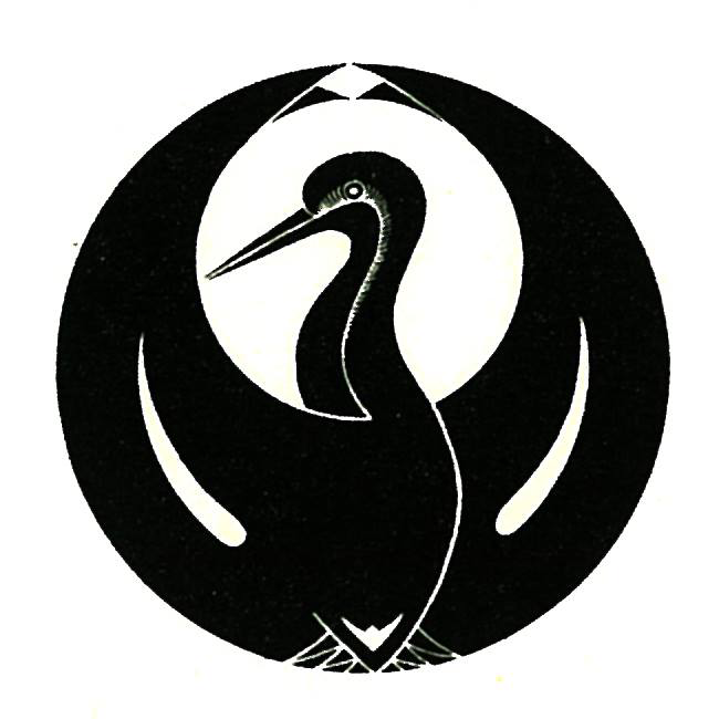 坂東家の家紋